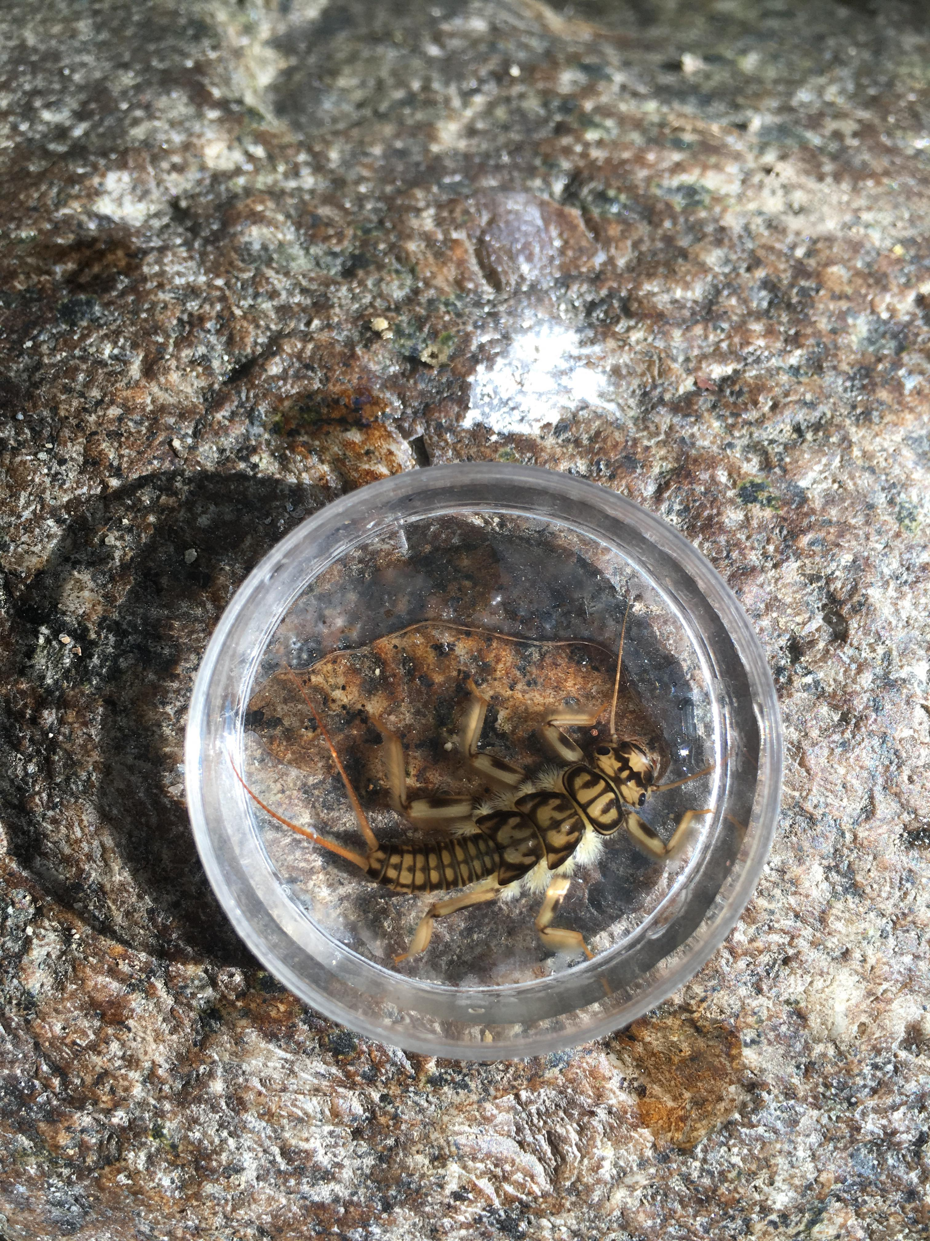 Perla marginata, la Brèze (Cévennes)